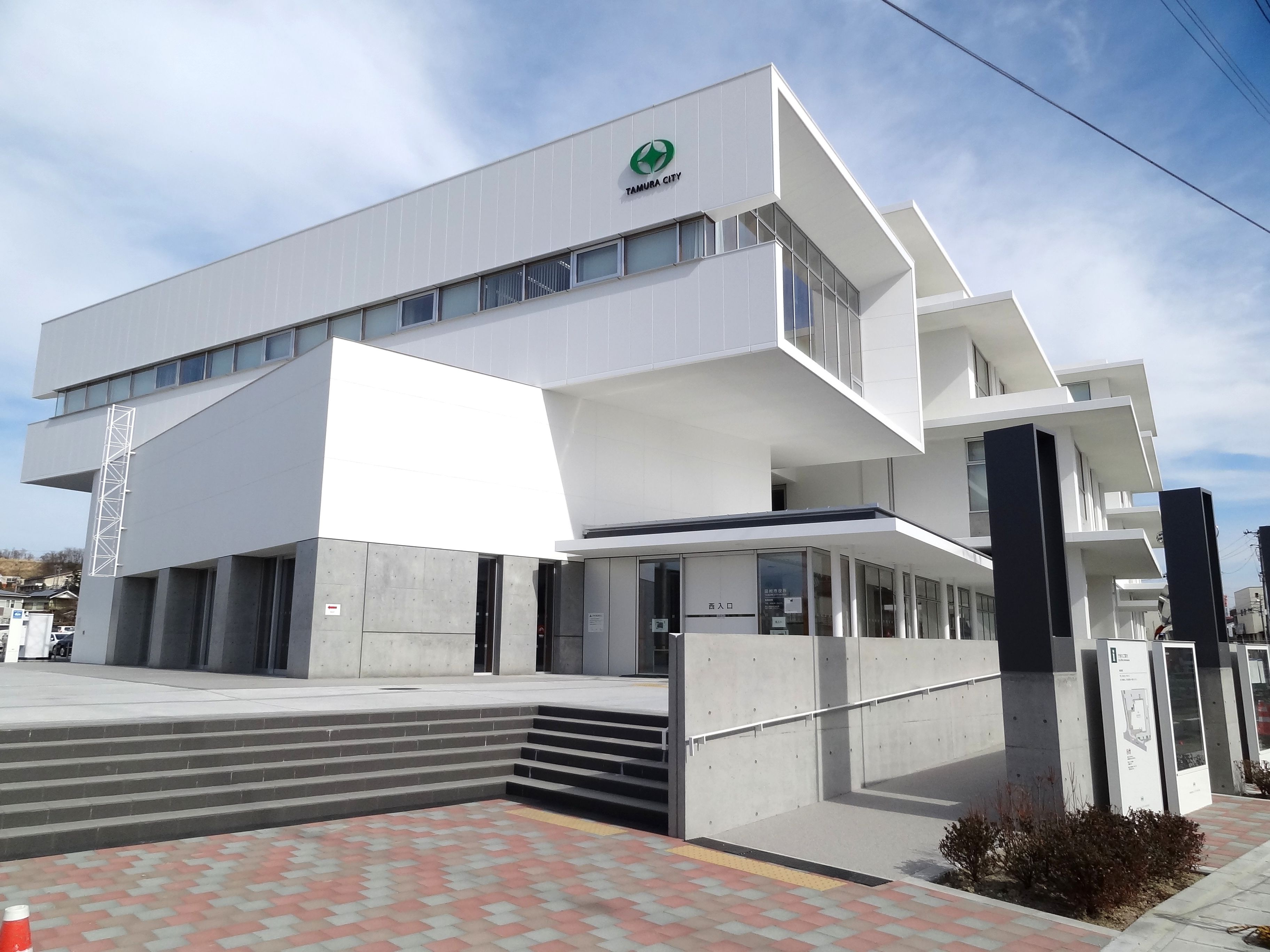 田村市役所